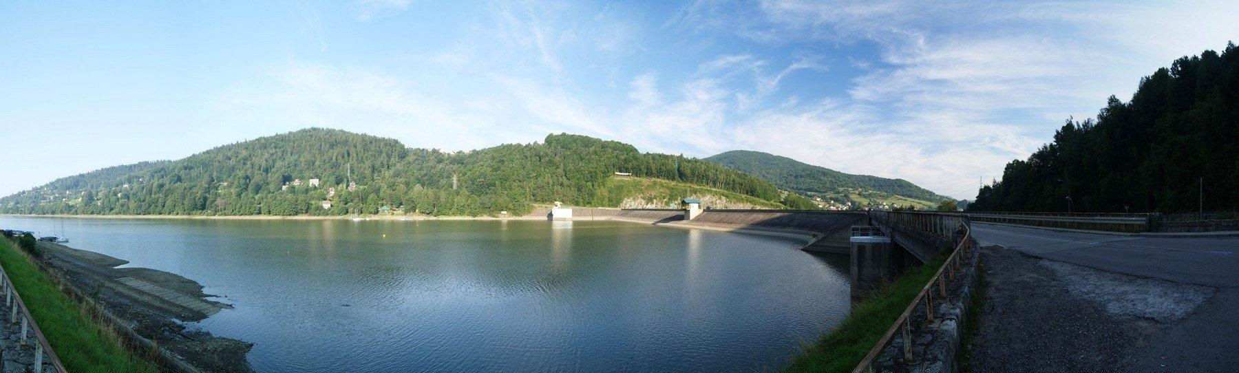 Zapora Tresna